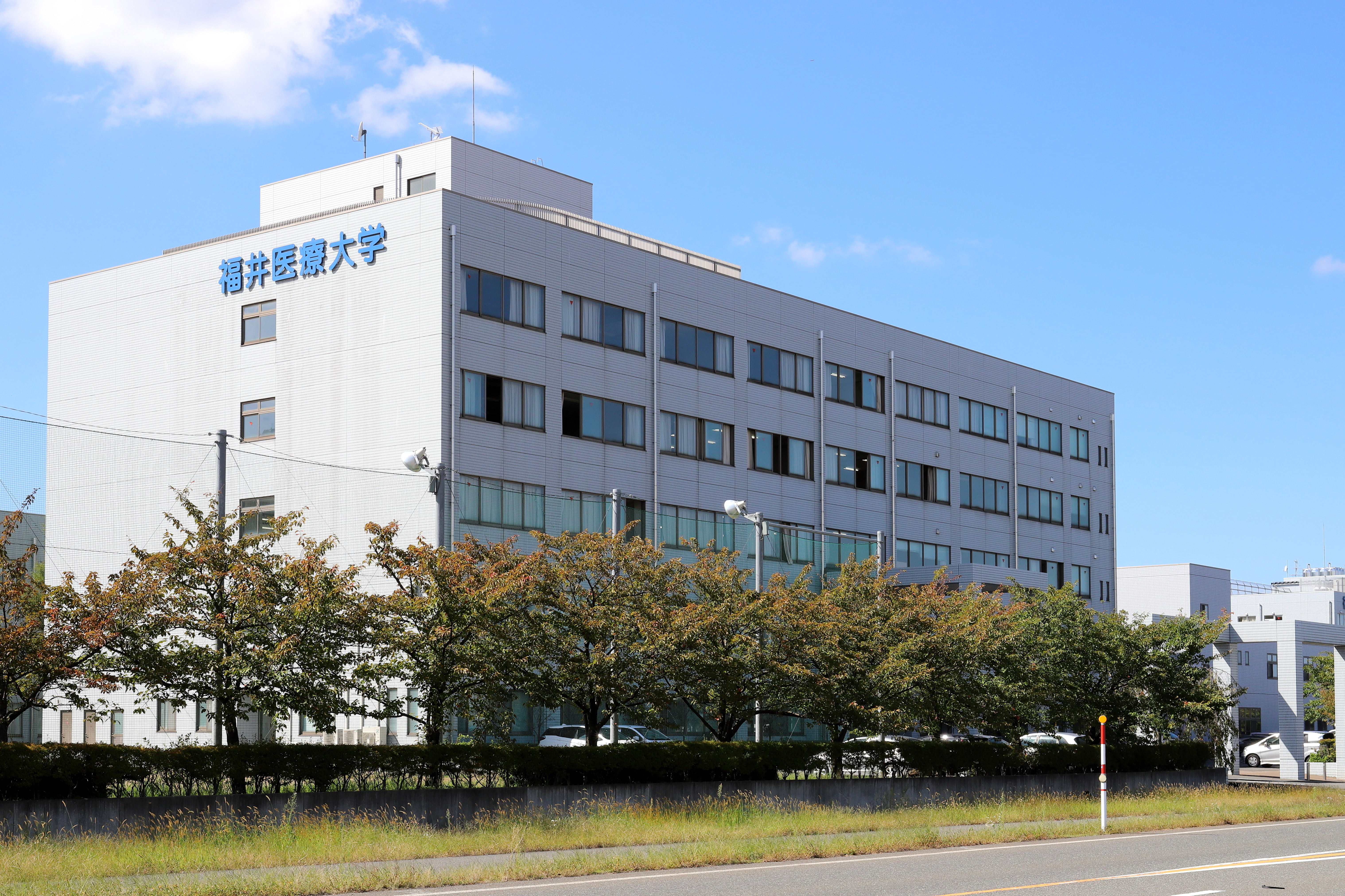 福井医療大学